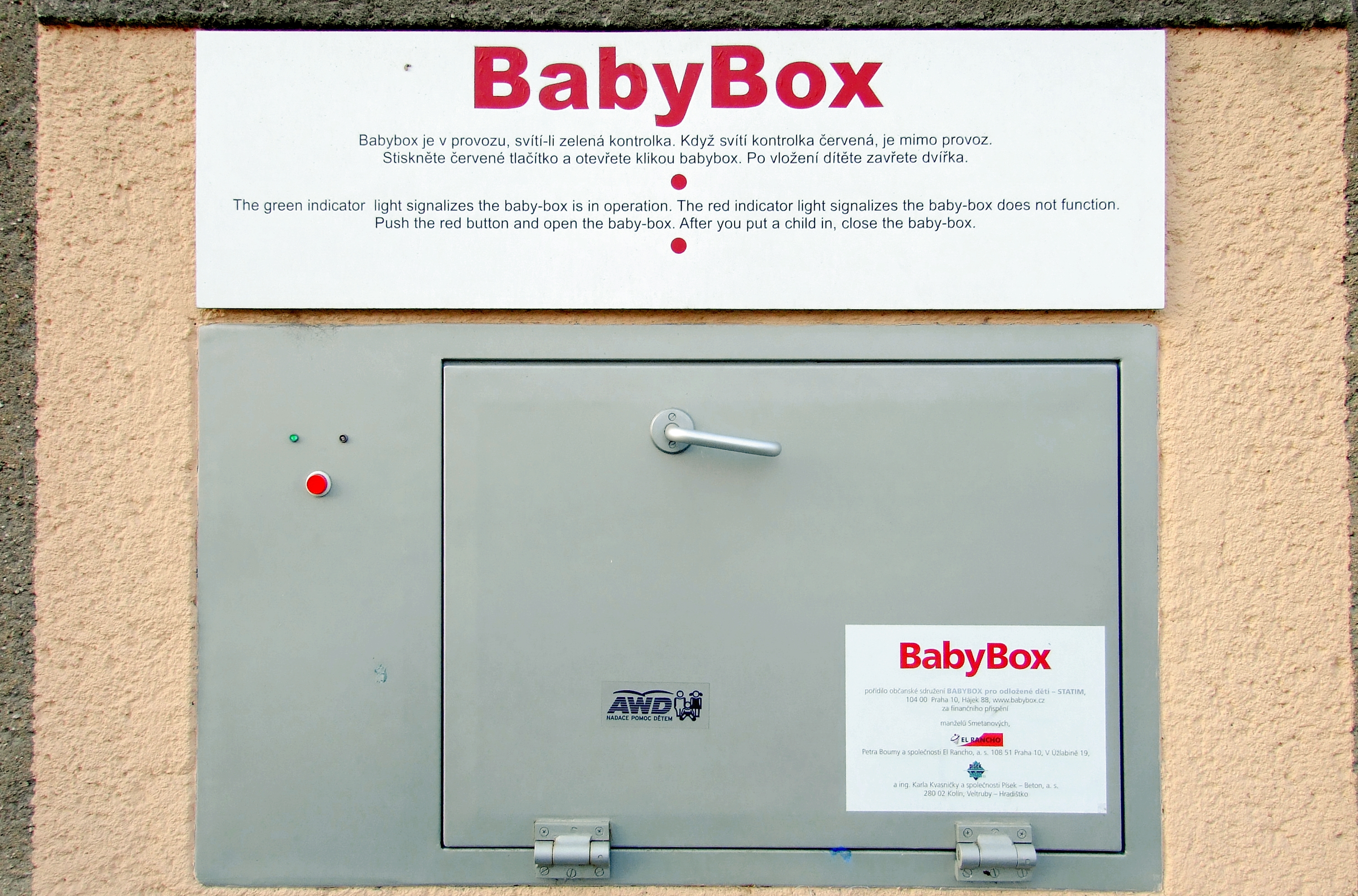 Venkovní strana babyboxu